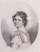 Geltrude Righetti (1793–1862)